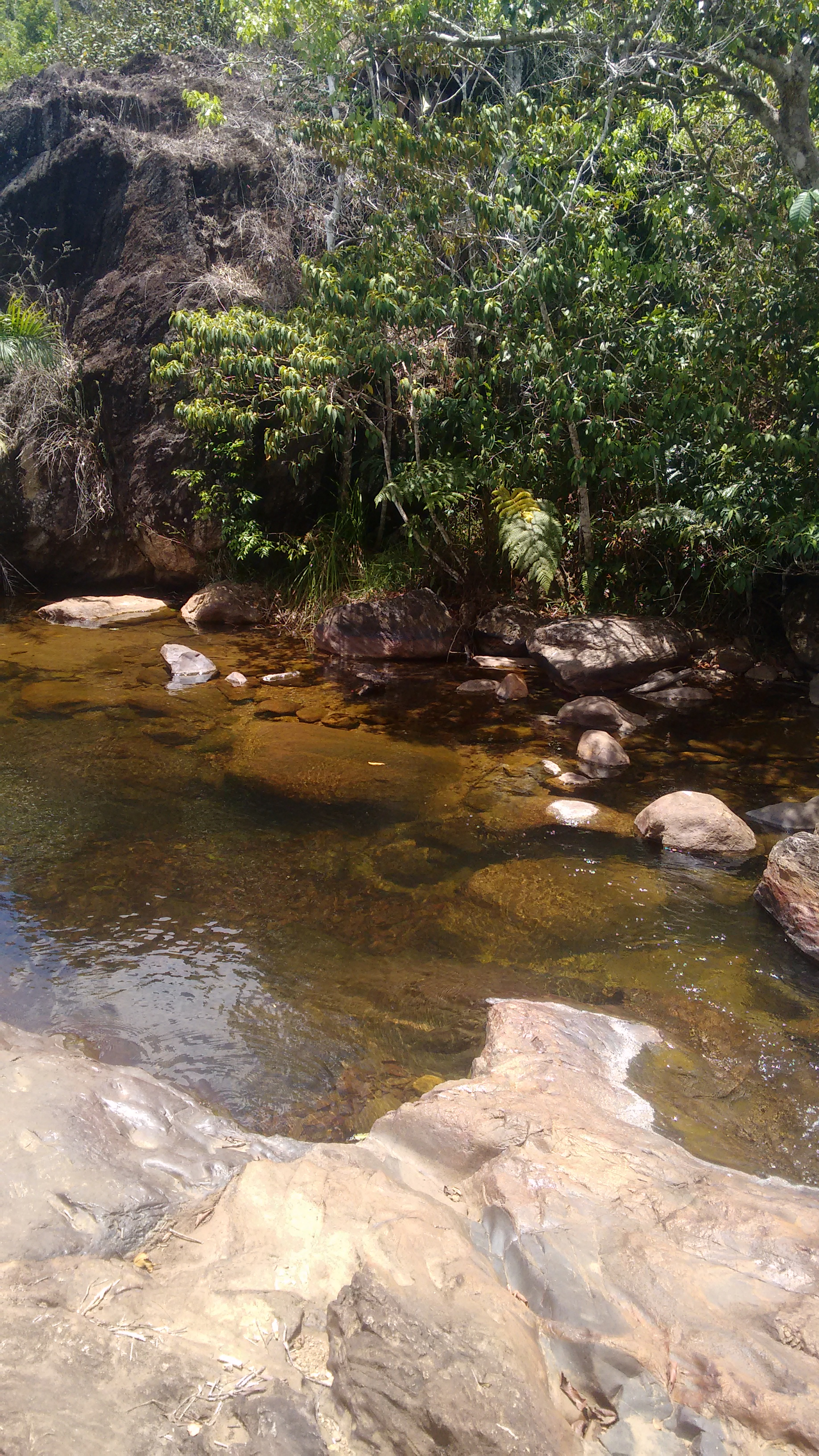 Região do Javí - Serra das Lontras